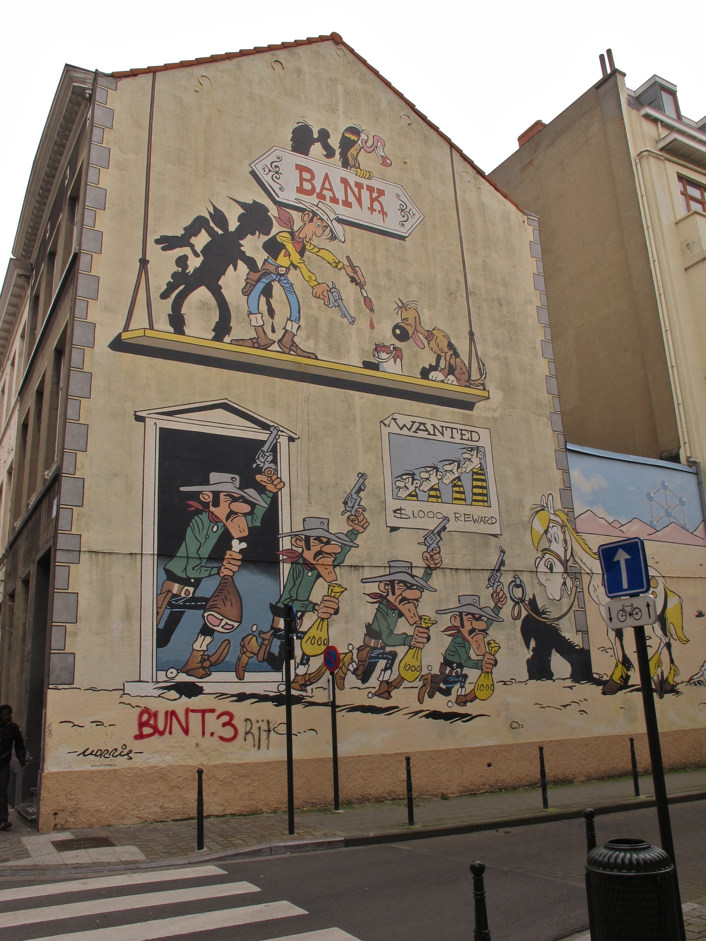 Lucky Luke und die Daltons. Wandgemälde in Brüssel, Rue de la Buanderie (Parcours bande dessinée)[1]